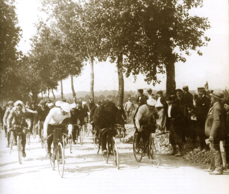 Tour de France 1903. The first kilometre in the history of cycle racing Tour de France. Der erste Kilometer in der Geschichte des Radrennens Tour de France. Le premier kilomètre dans l'histoire des courses cyclistes du Tour de France. El primer kilómetro en la historia de la carrera ciclista de la Tour de France. Первый километр в истории велогонки Тур де Франс.